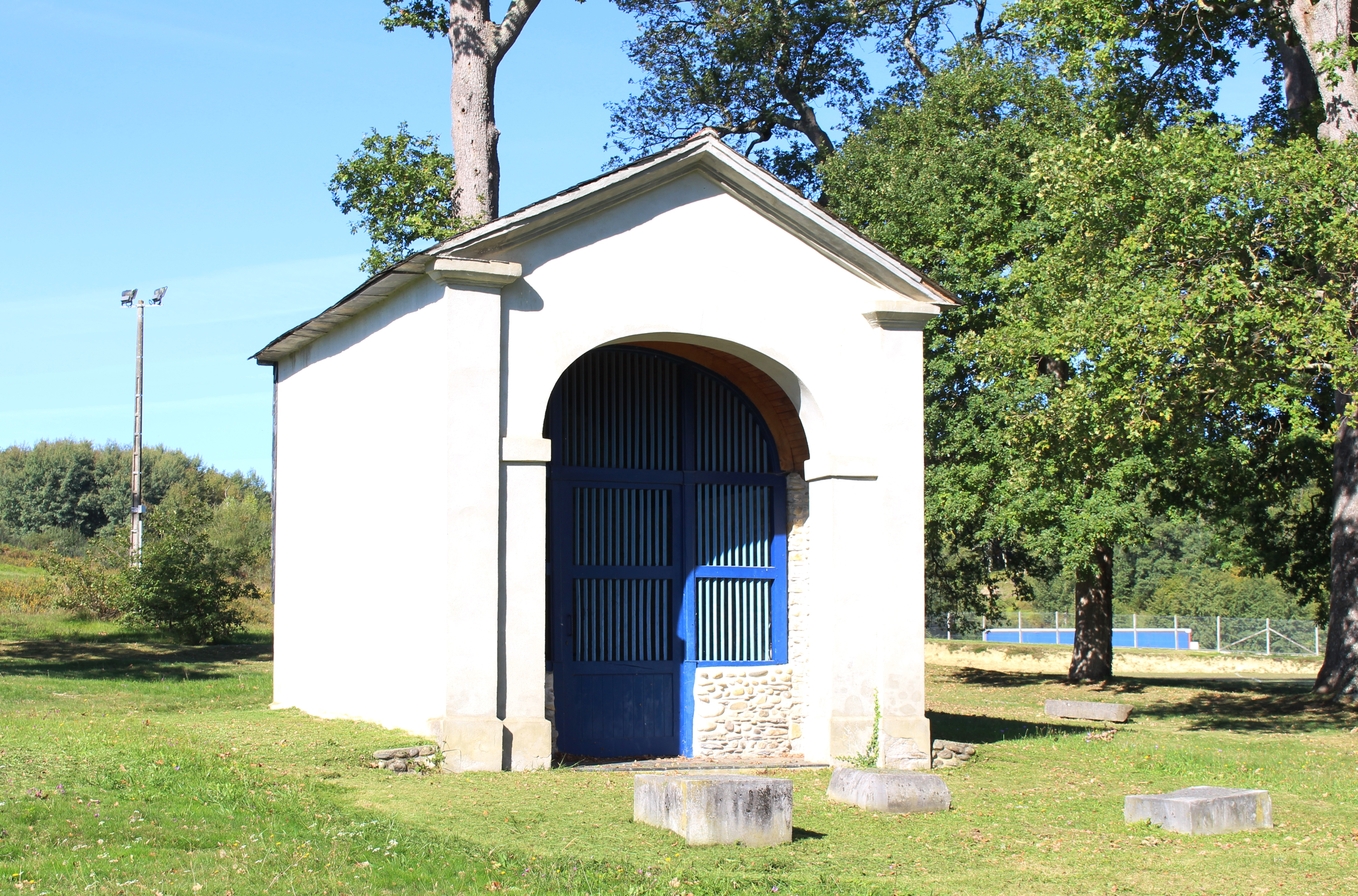 Chapelle Saint-Roch de Lanne (Hautes-Pyrénées)